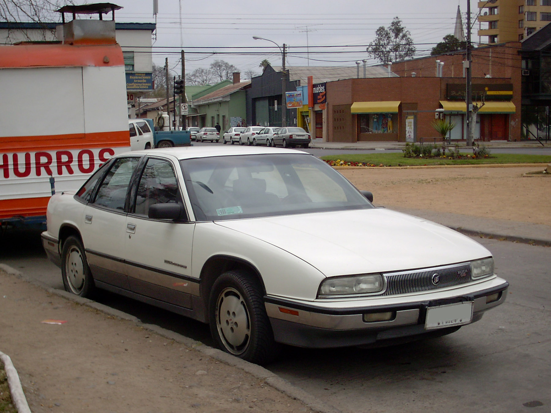 Buick Regal Grand Sport 1991